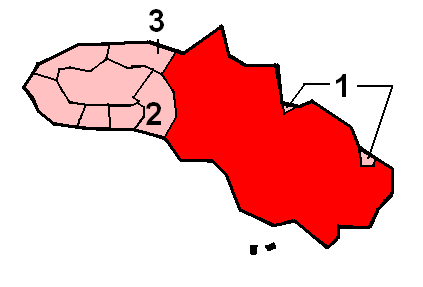 Het Kamberaas tussen de andere talen van Soemba (Oost-Nusa Tenggara, Indonesië). Eigen werk, vrij voor het publiek.